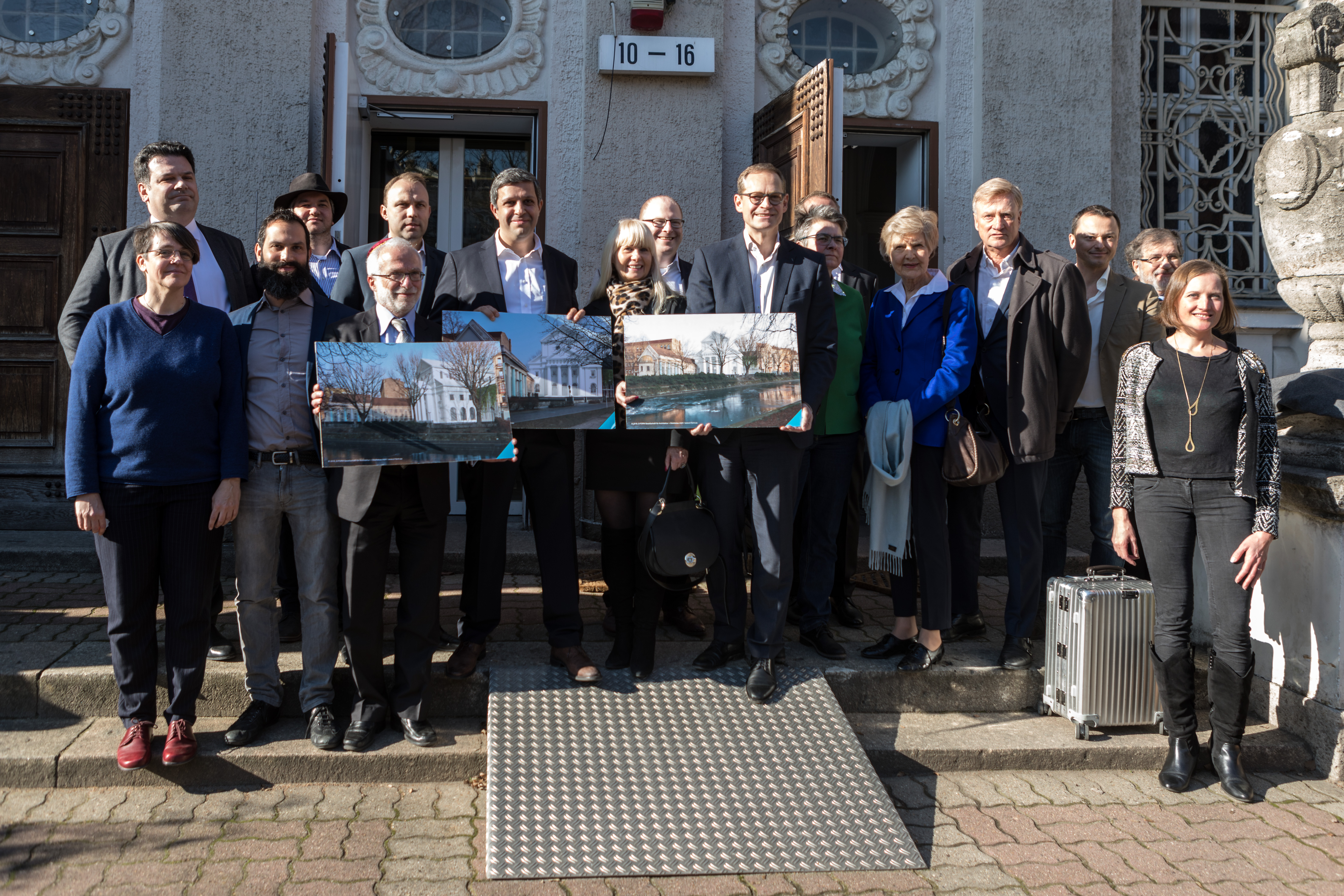 Das Kuratorium für den Wiederaufbau der Fraenkelufer Synagoge. Photo: Boaz Arad Photography